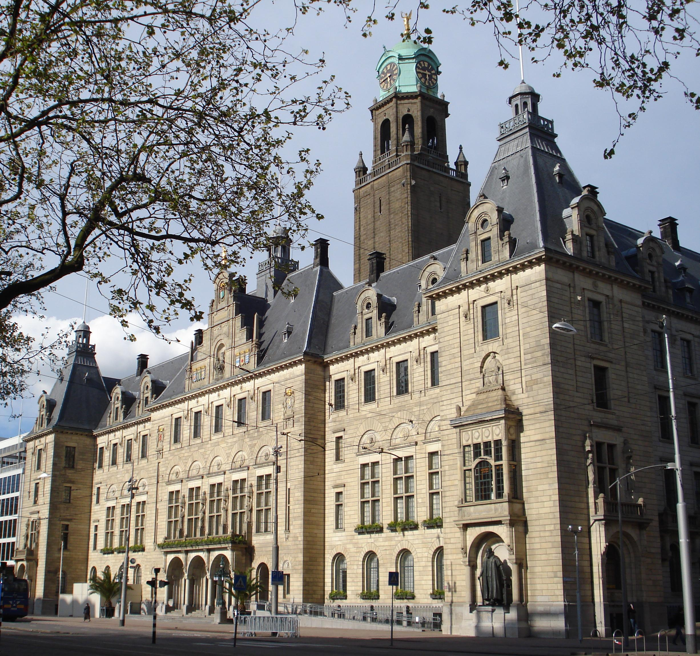 Rotterdam, Coolsingel. Rotterdams stadhuis. Rijksmonument.